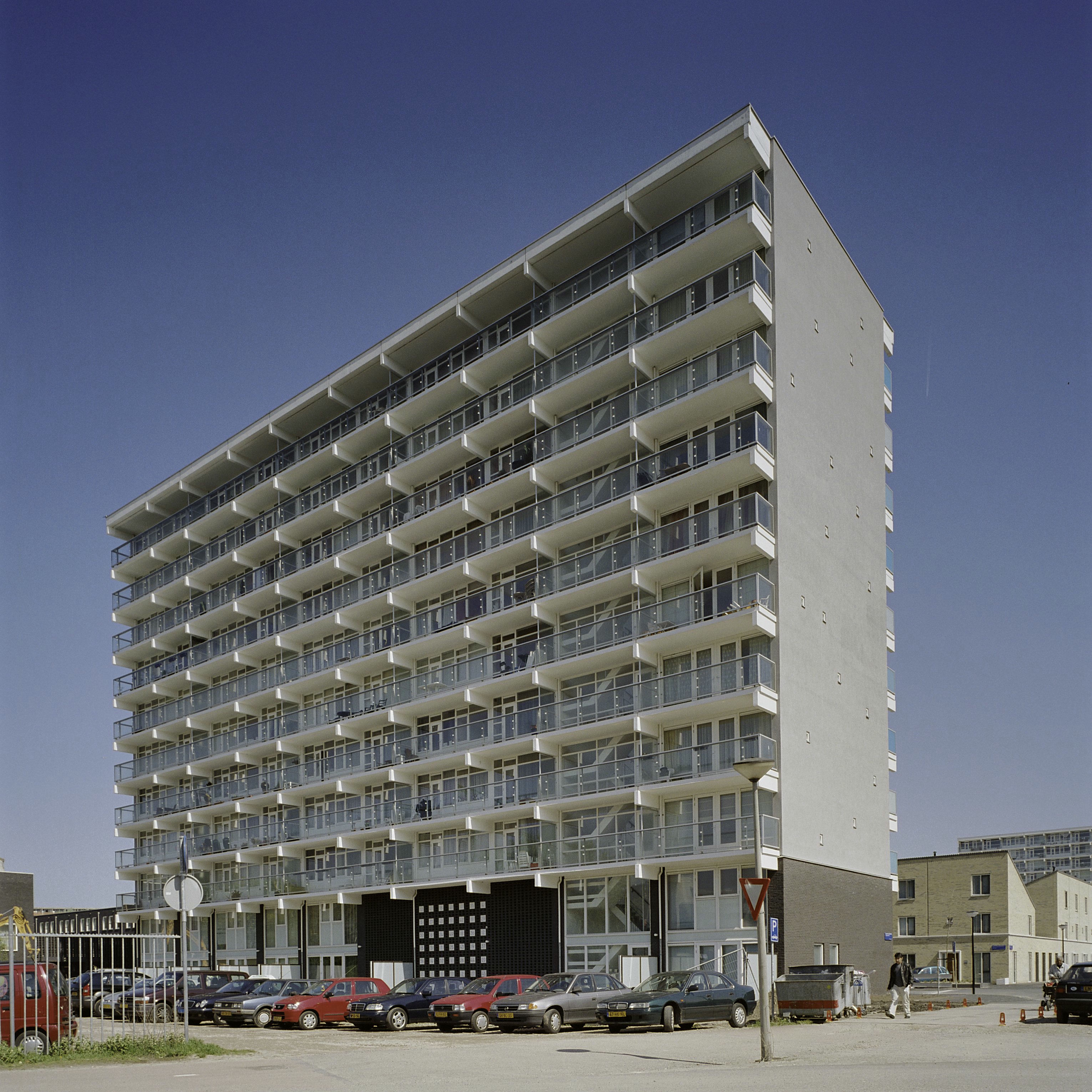 Frissenstein: Overzicht galerijflat van tien verdiepingen in de Bijlmermeer (opmerking: Gefotografeerd voor Monumenten In Nederland Noord-Holland)